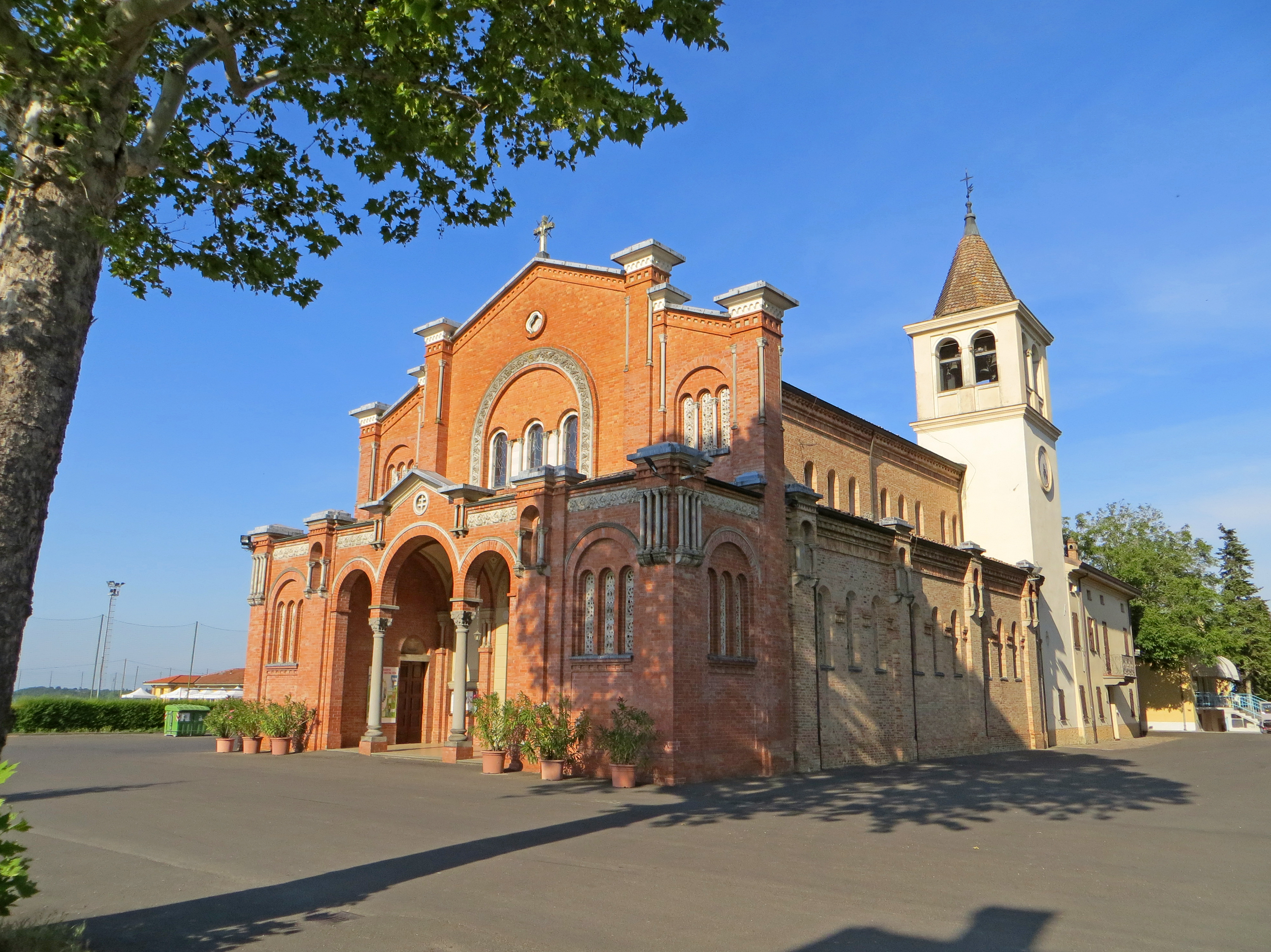 Chiesa di San Giovanni Battista (Basilicanova, Montechiarugolo) - facciata e lato sud